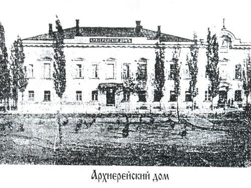 Новочеркасск. Архиерейский дом.